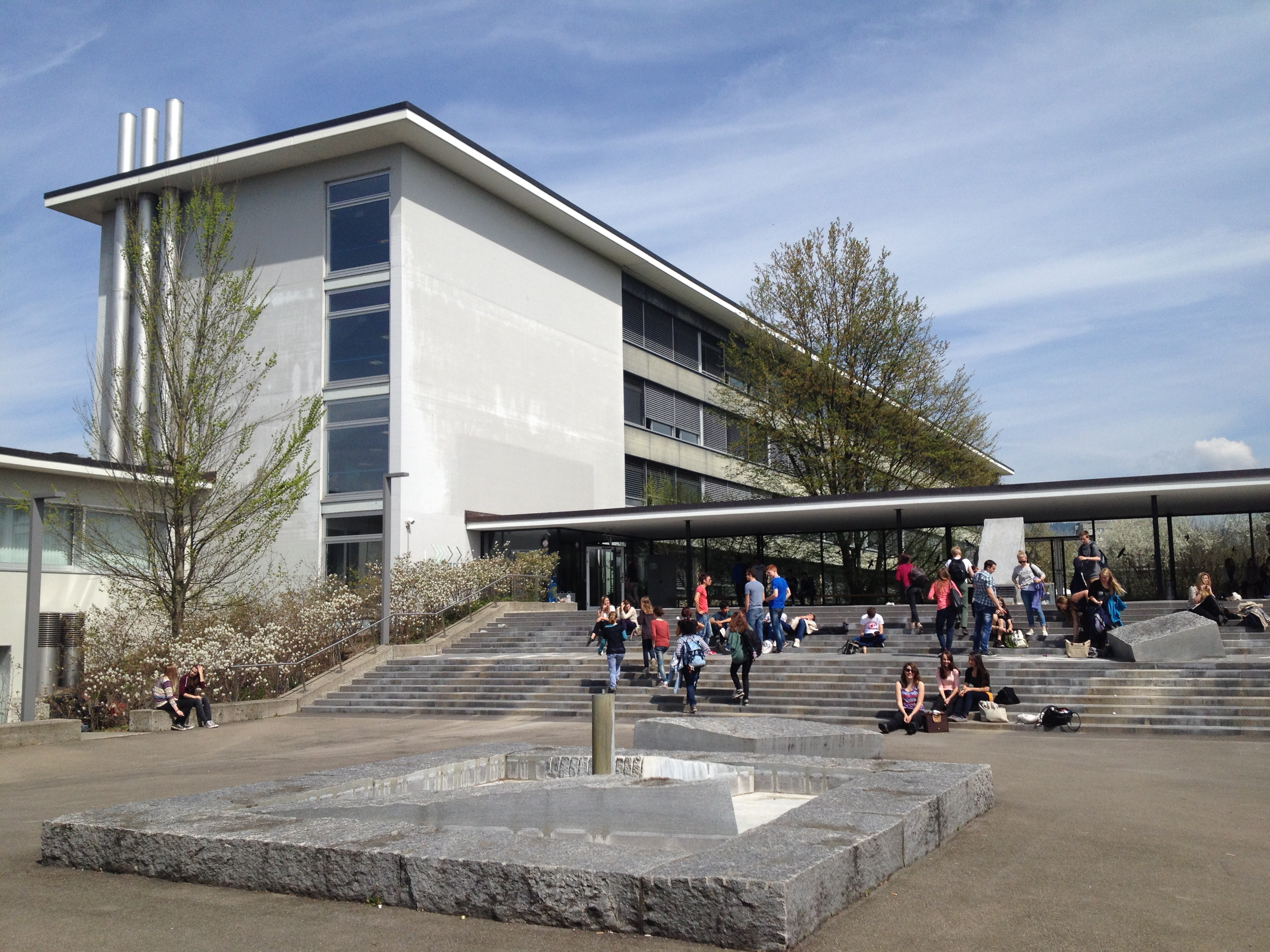 Die Freitreppe der Kantonsschule Zürcher Oberland